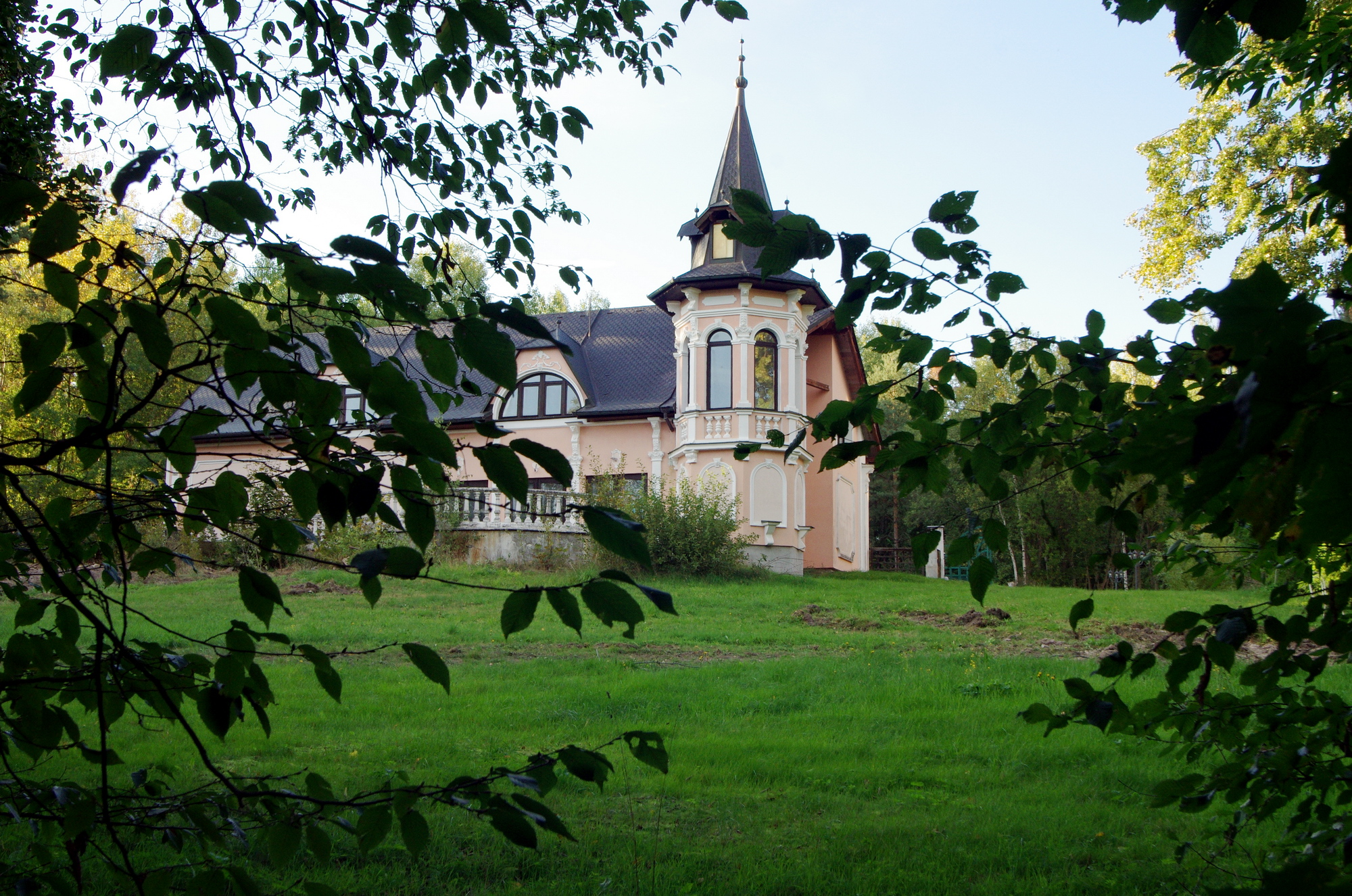 Lesní zámeček (hotel Evropa), Antonínova výšina, Vojtanov